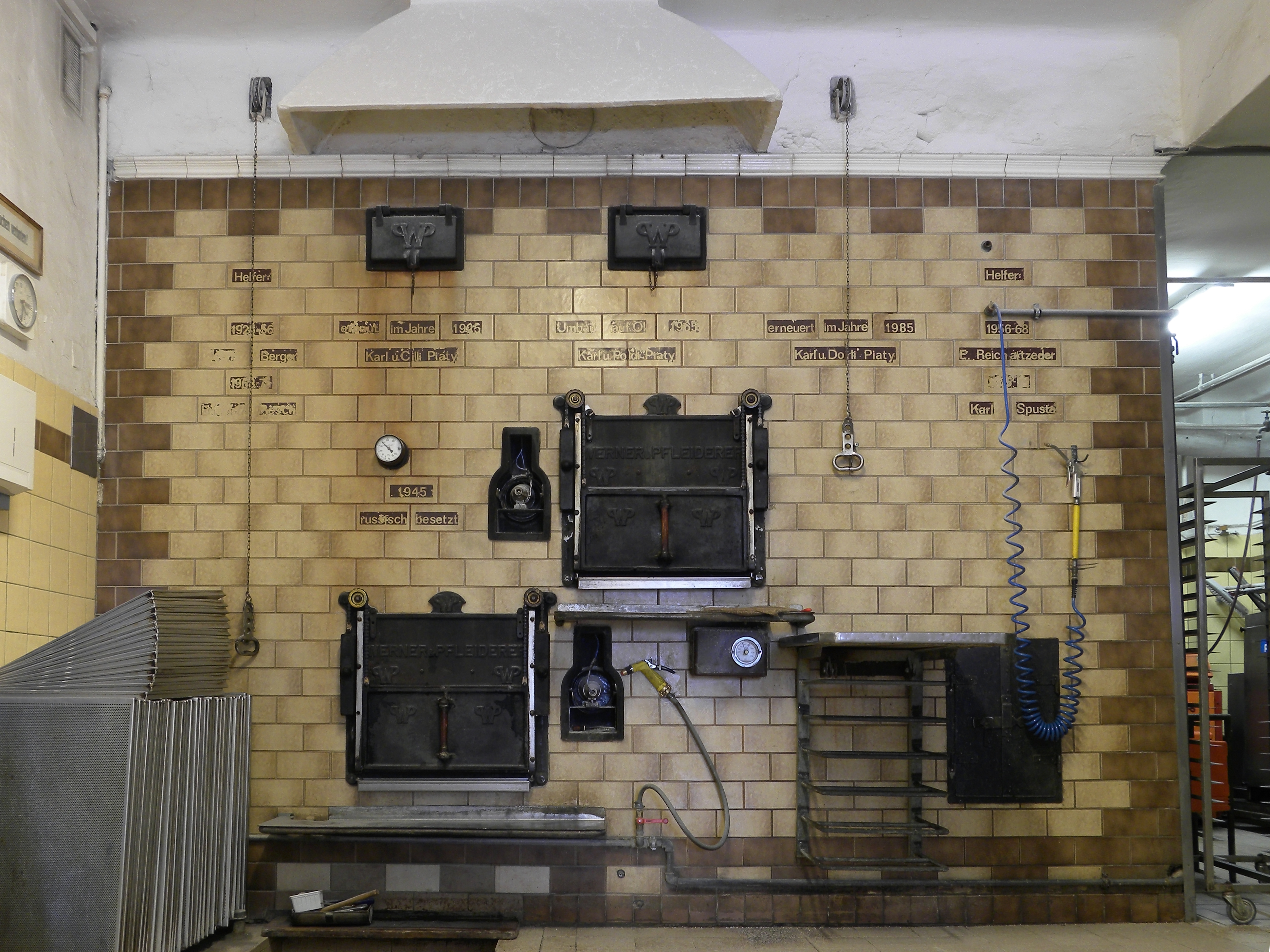 Dieser Dampfbackofen der Konditorei Piaty in Waidhofen an der Ybbs wurde im Jahr 1925 als größter Dampfbackofen Österreichs errichtet. Die Firma "Werner und Pfleiderer" gab darauf eine hundertjährige Garantie.